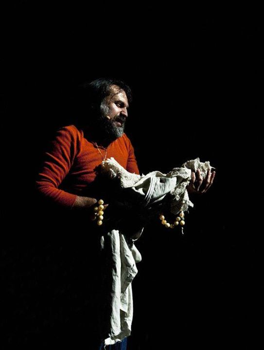 Foto ritraente il drammaturgo italiano Mimmo Borrelli